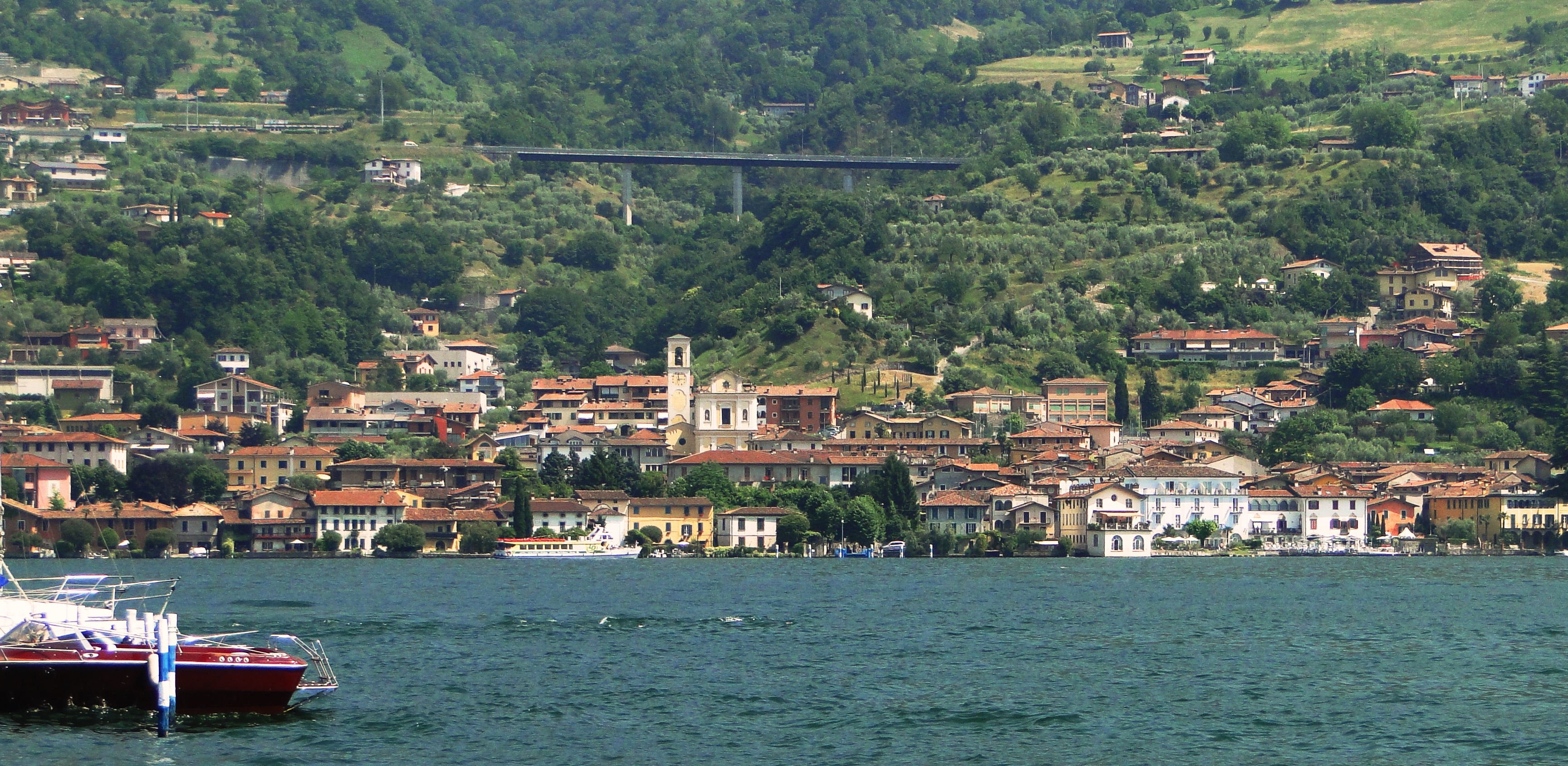 Sulzano, vista panoramica da Monte Isola. Lago d'Iseo